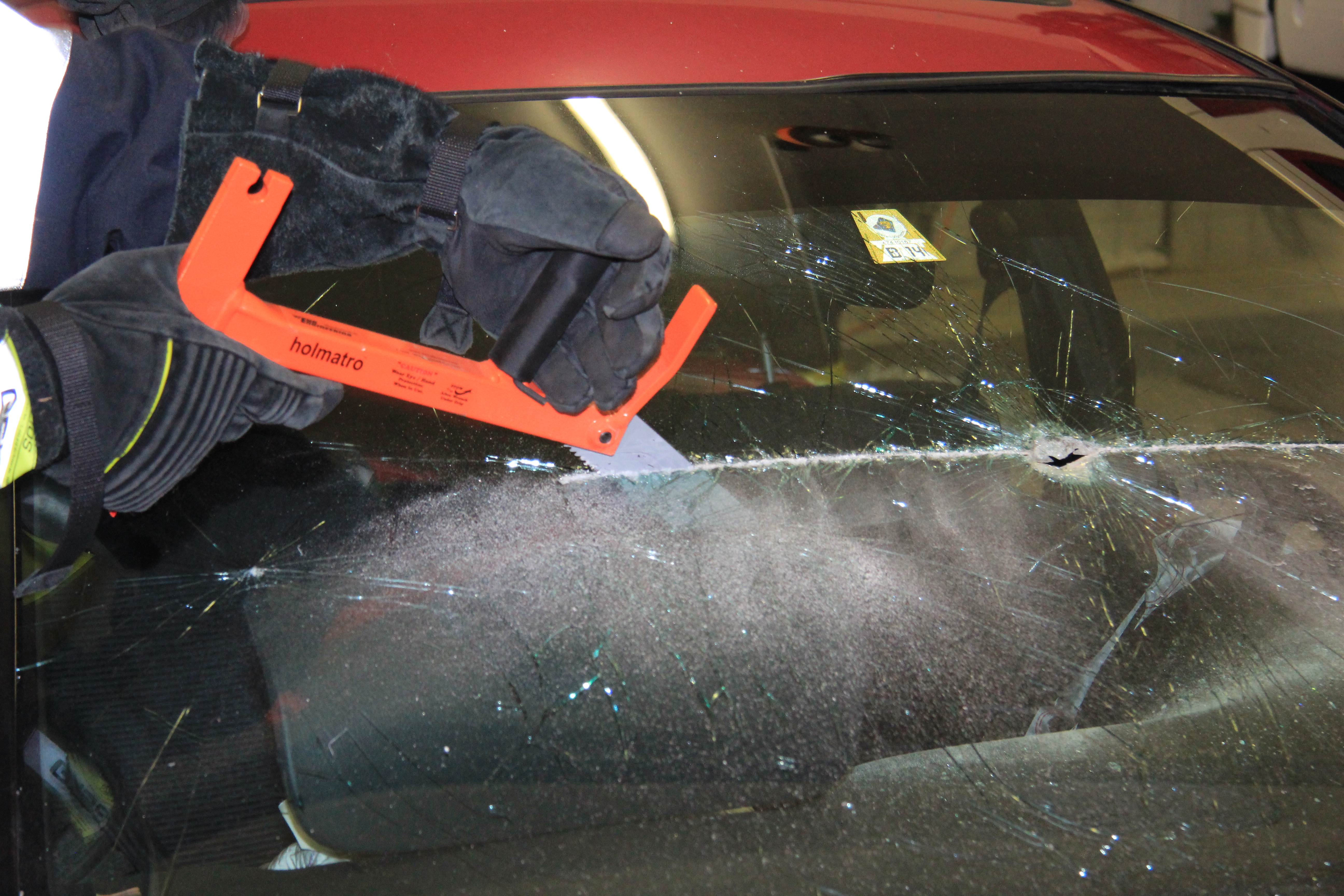 Übung mit Glassäge an einem verunfallten PKW bei einer österreichischen Feuerwehr